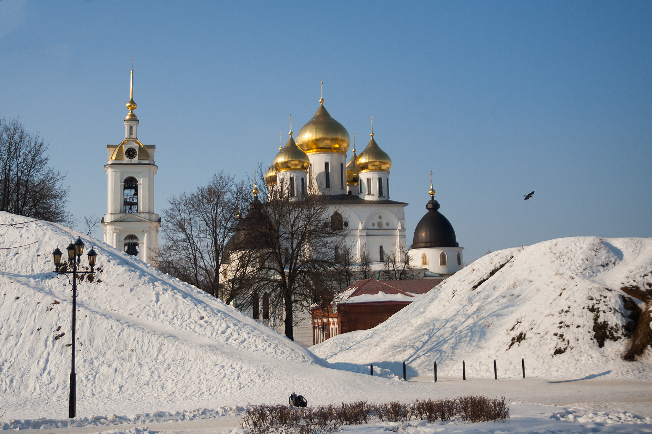 Дмитровский кремль: В центральной части города, Дмитров, Дмитровский район, Московская область This image is related to the protected area of Russia number 5000039